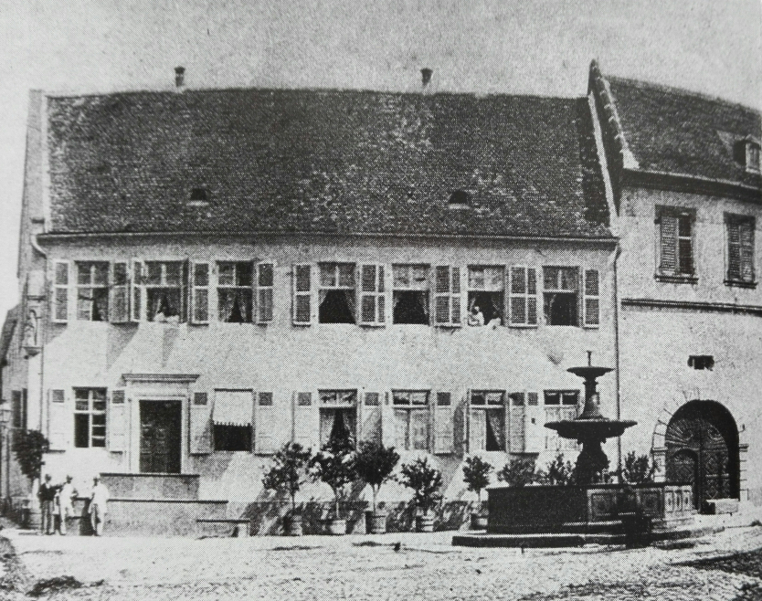 Anwesen Eckel, heute Deidesheimer Hof, um 1900